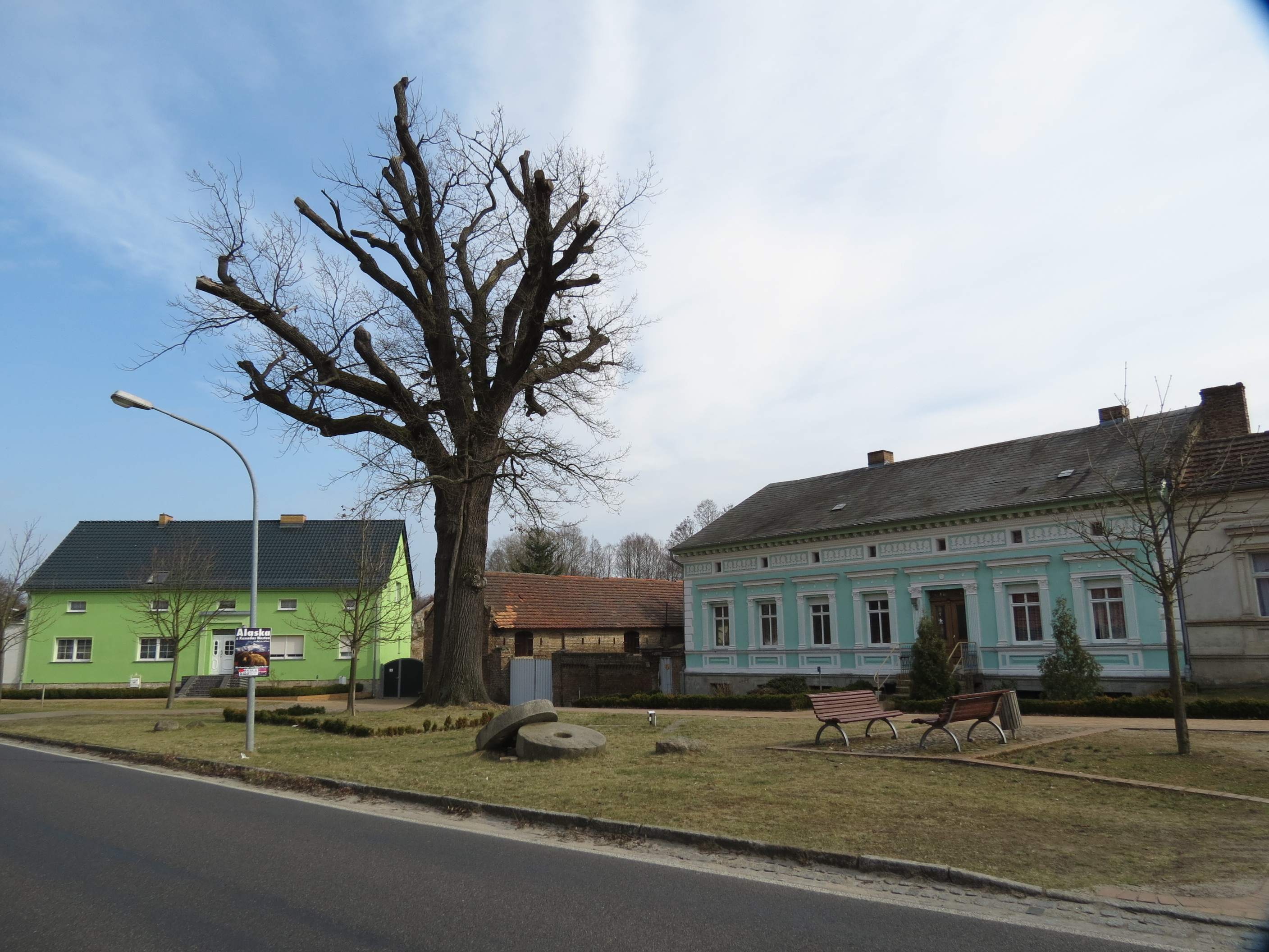 Klausdorf, Gem. Am Mellensee, Lkr. Teltow-Fläming, Brandenburg, Deutschland, Dorfaue, Naturdenkmal Dorfeiche